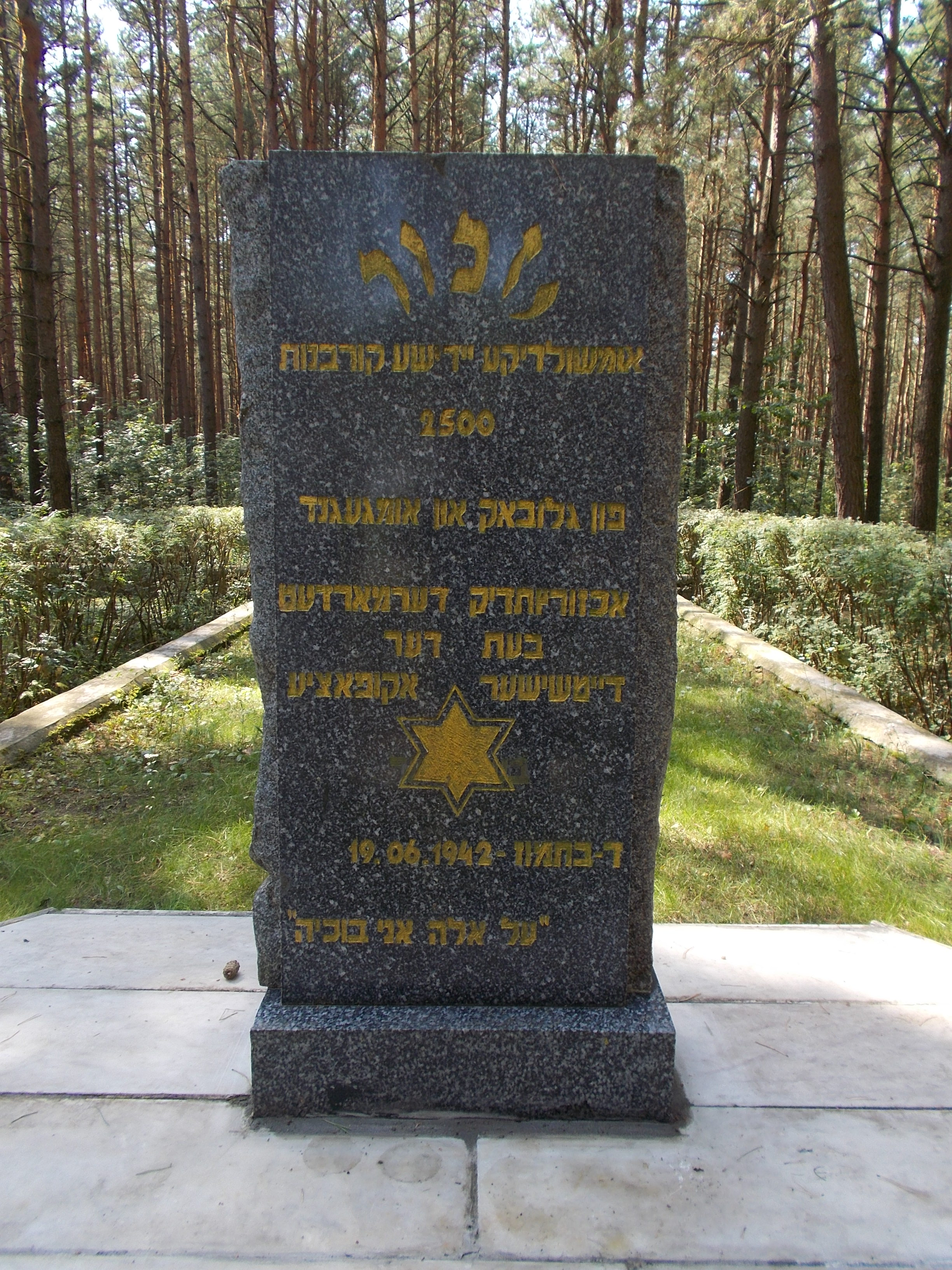 Глубокое Витебской области. Памятник убитым евреям - узникам гетто.